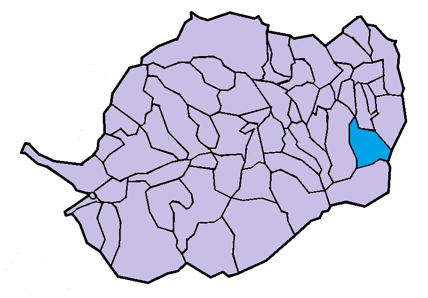 Vallestàvia en el Conflent, a partir del mapa municipal del Conflent de lliure disposició adaptat al Nomenclàtor toponímic aprovat el 2007